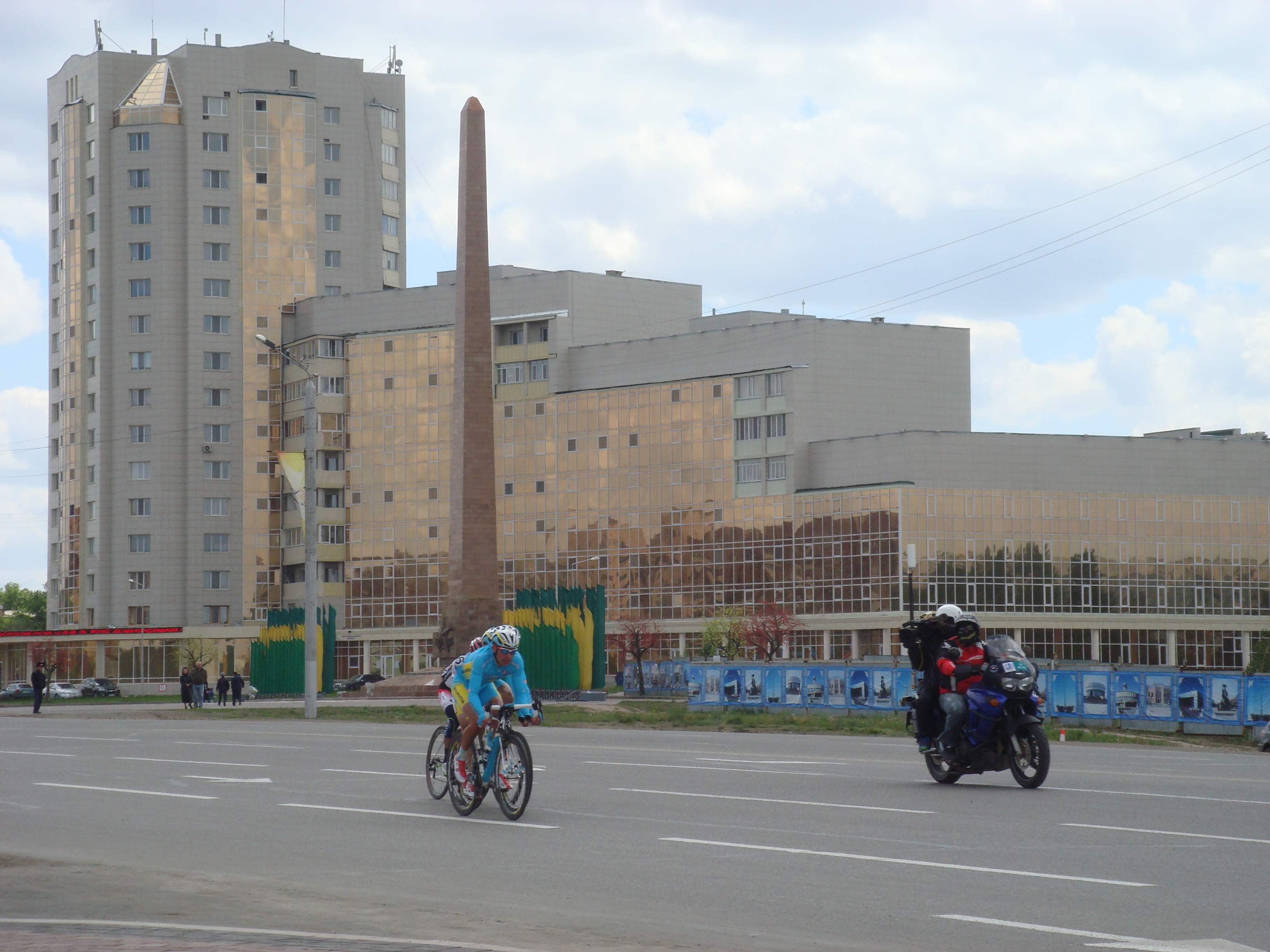 Чемпионат Азии по велоспорту 2014. На заднем плане бизнес-центр «Сары-Арка» АО «Жайремский ГОК» группы ENRC